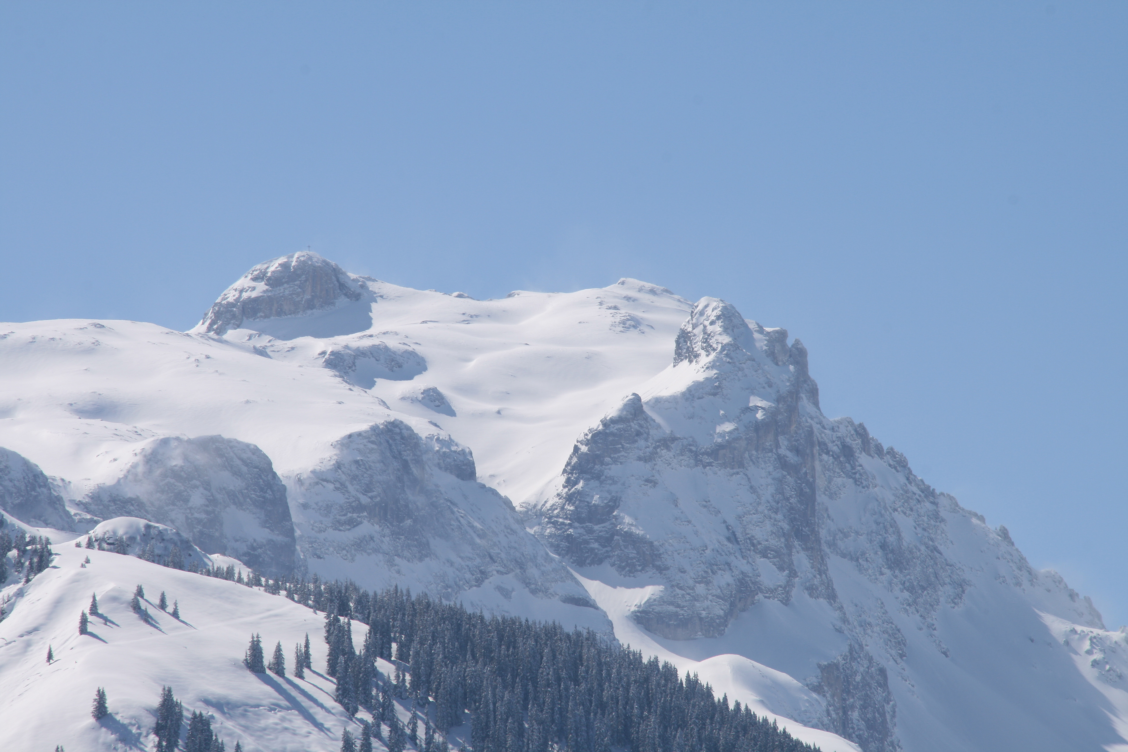 Blick vom Bergpanoramastandort neben der Kirche in Bartholomäberg auf die gegenüberliegenden Berge des Rätikon. Hier die Sulzfluh mit 2818m Rechts die Kleine Sulzfluh mit 2708m.